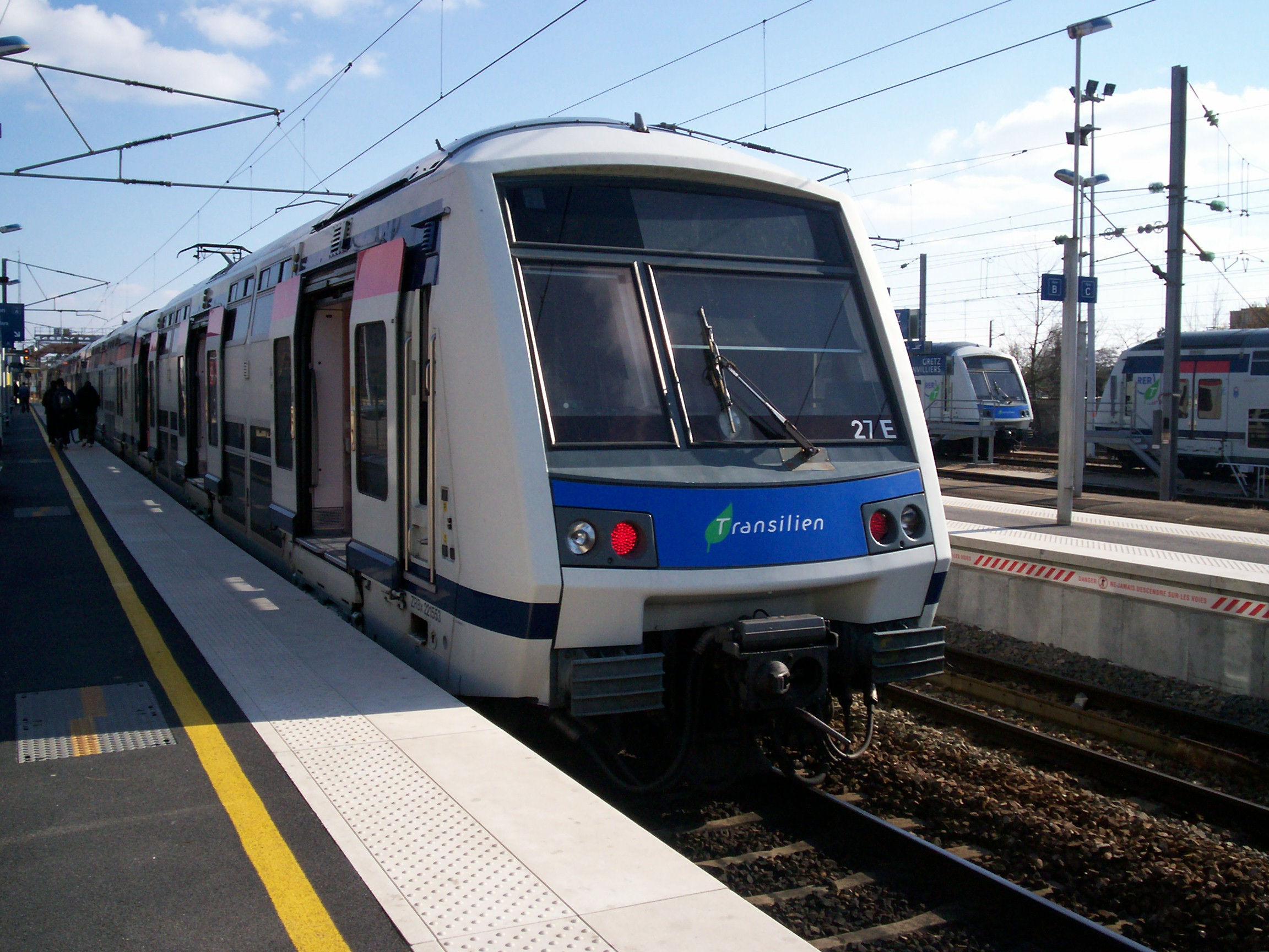 RER E - Gare de Gretz-Armainvilliers